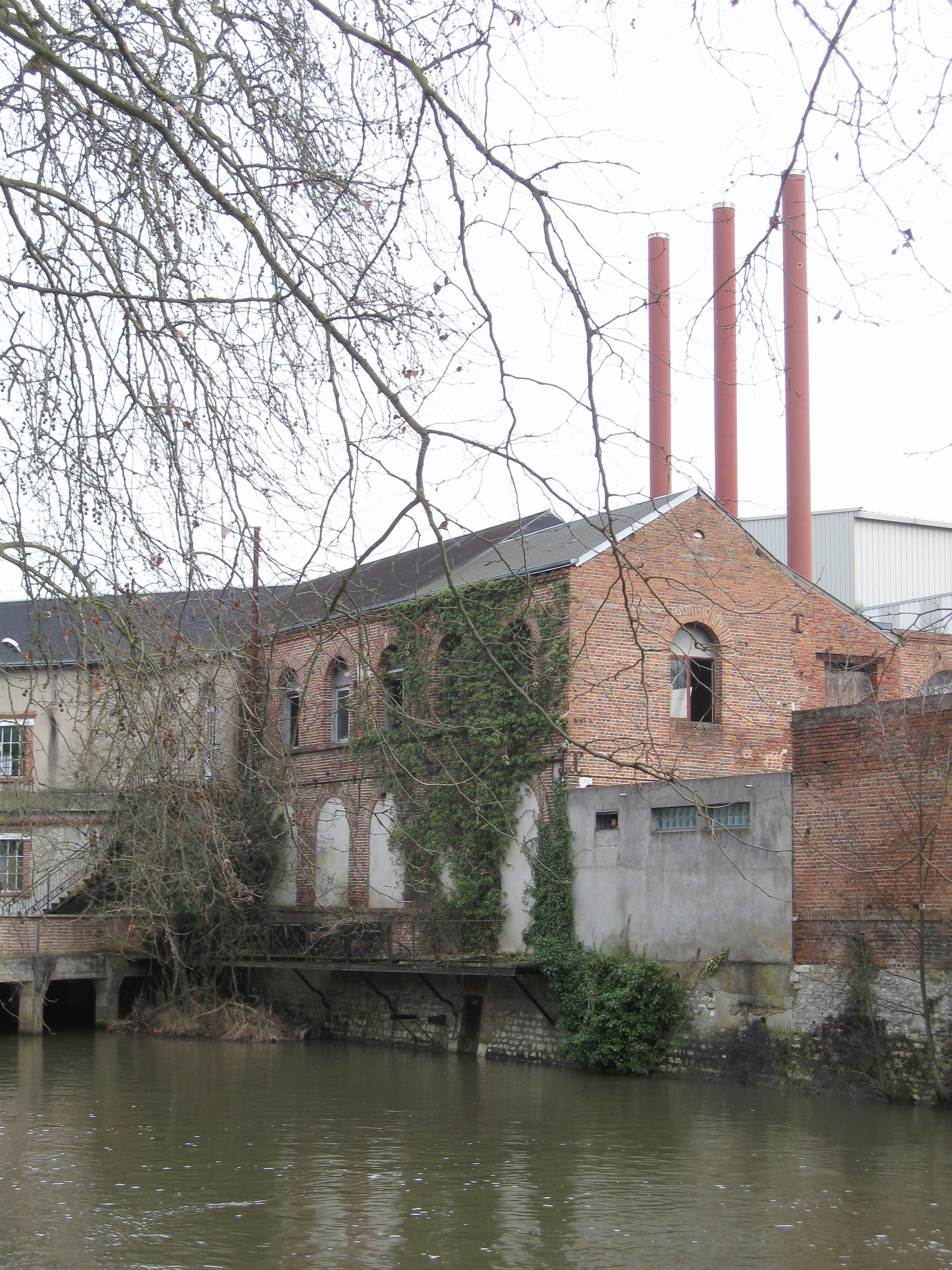 Bâtiments au bord de la Sauldre de l'ancienne usine Matra, Romorantin-Lanthenay, Loir-et-Cher, France